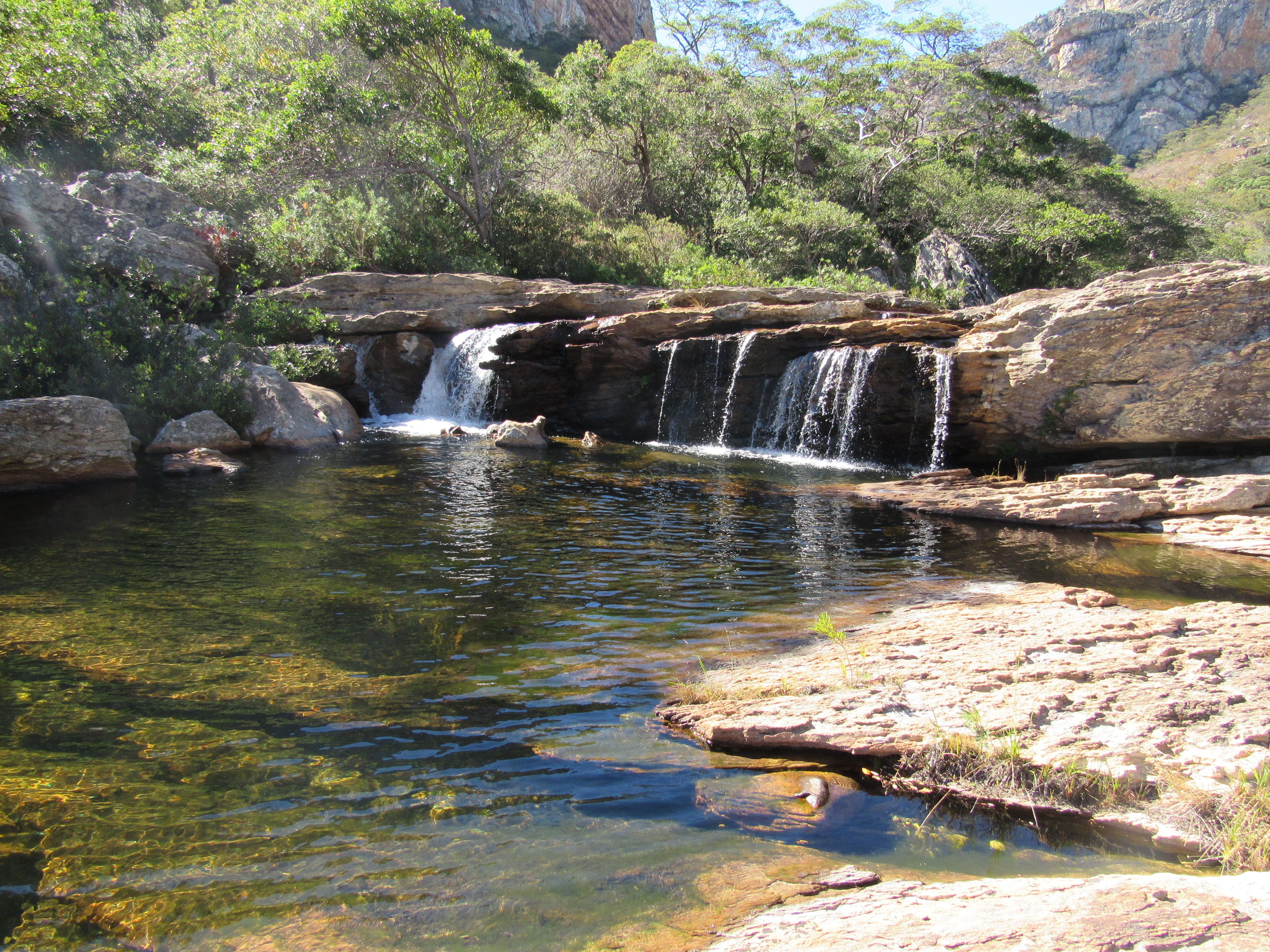 Panorama da 4ª cachoeira do Serrado no Parque estadual Serra Nova